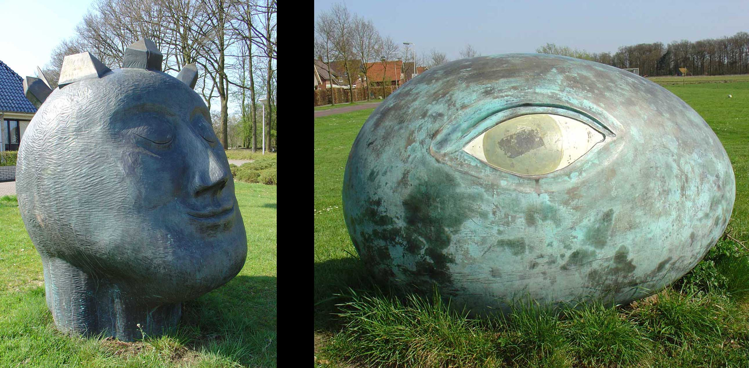 Van oud naar nieuw deel 1 kop van koning Othmar door Koopman & Bolink Ootmarsum 1998